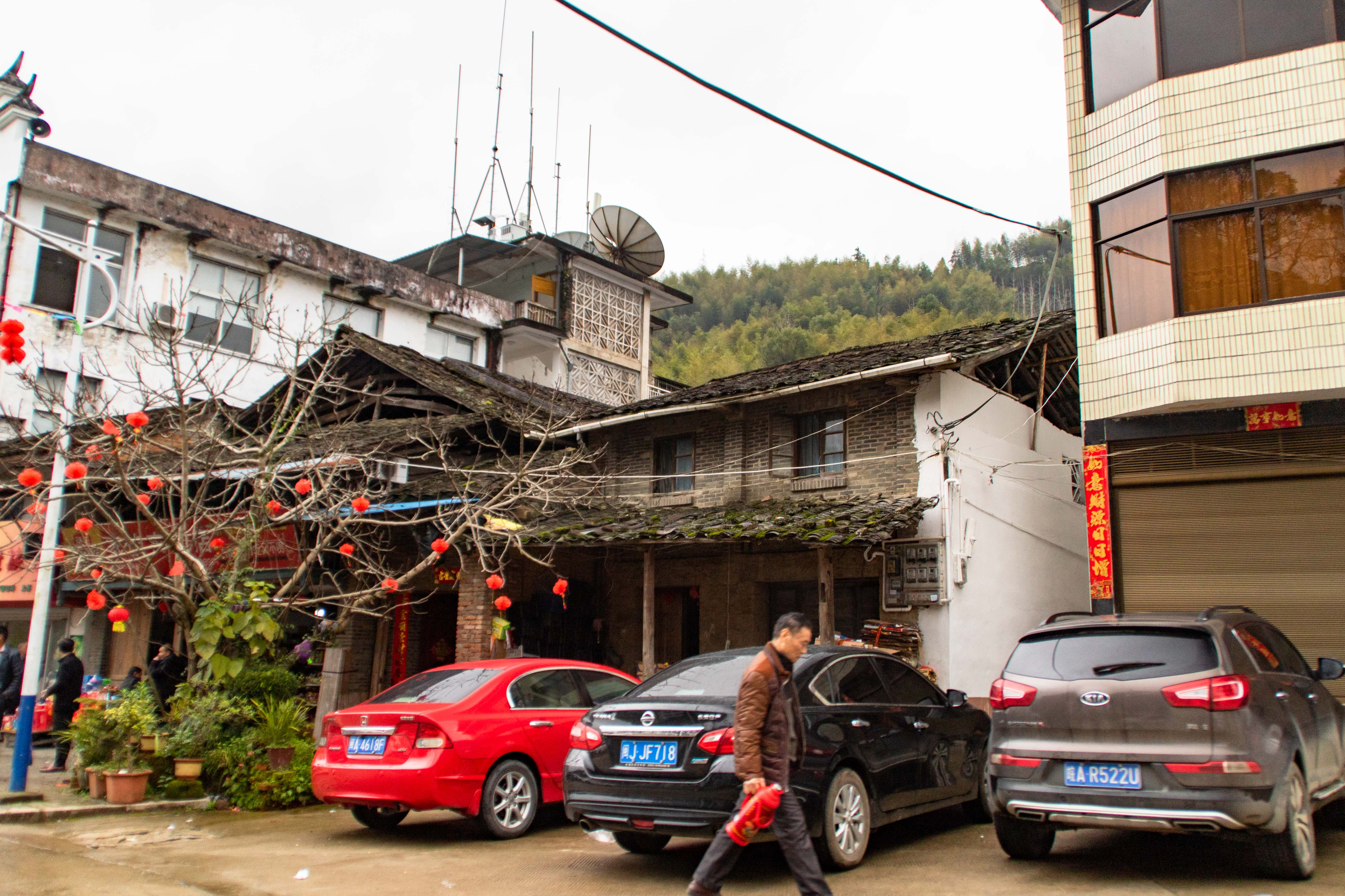 中文（中国大陆）: 福安市社口镇坦洋村